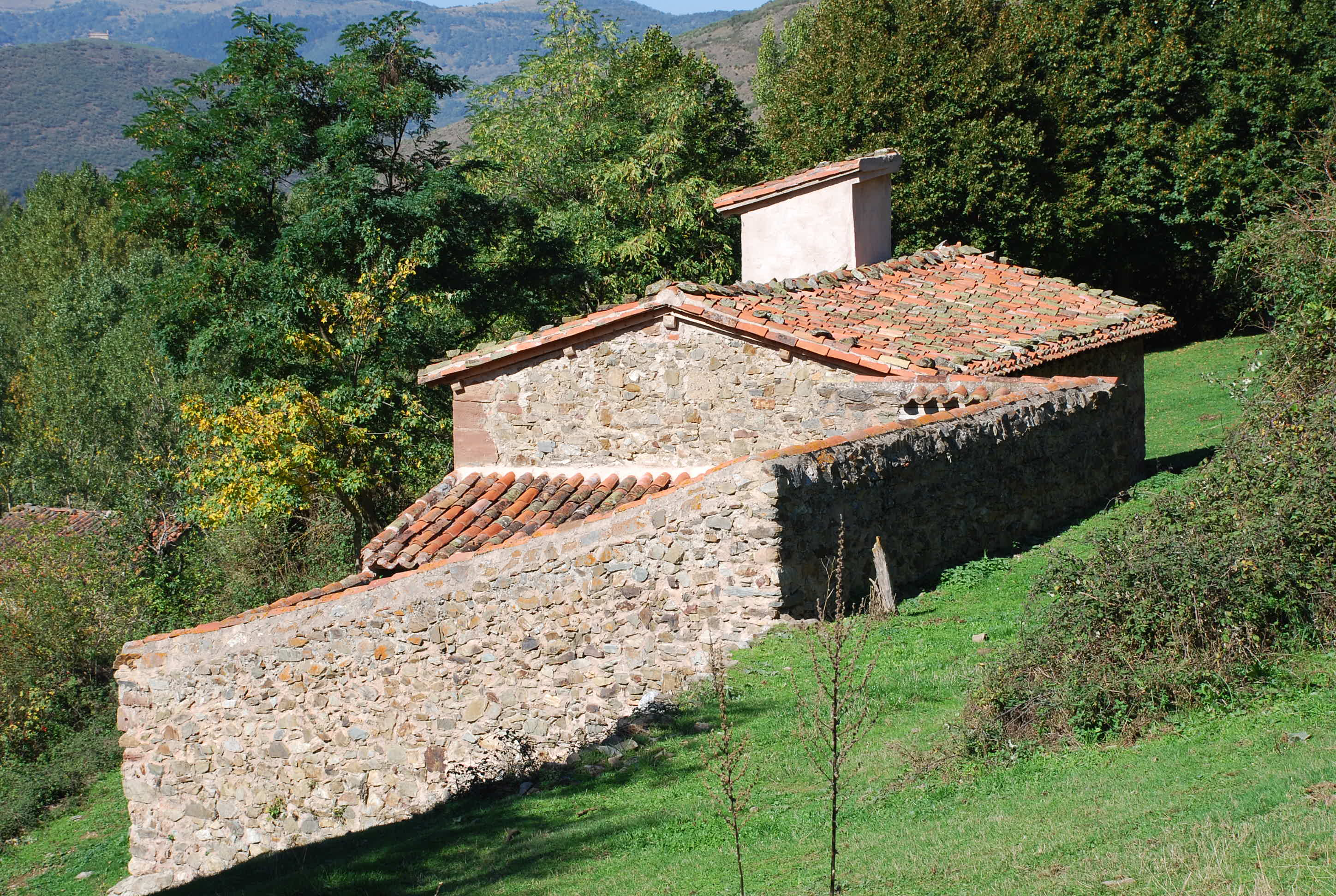 Iglesia de Cilbarrena, aldea despoblada de Ezcaray en La Rioja (España).